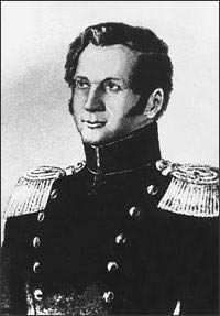 Павел Петрович Аносов